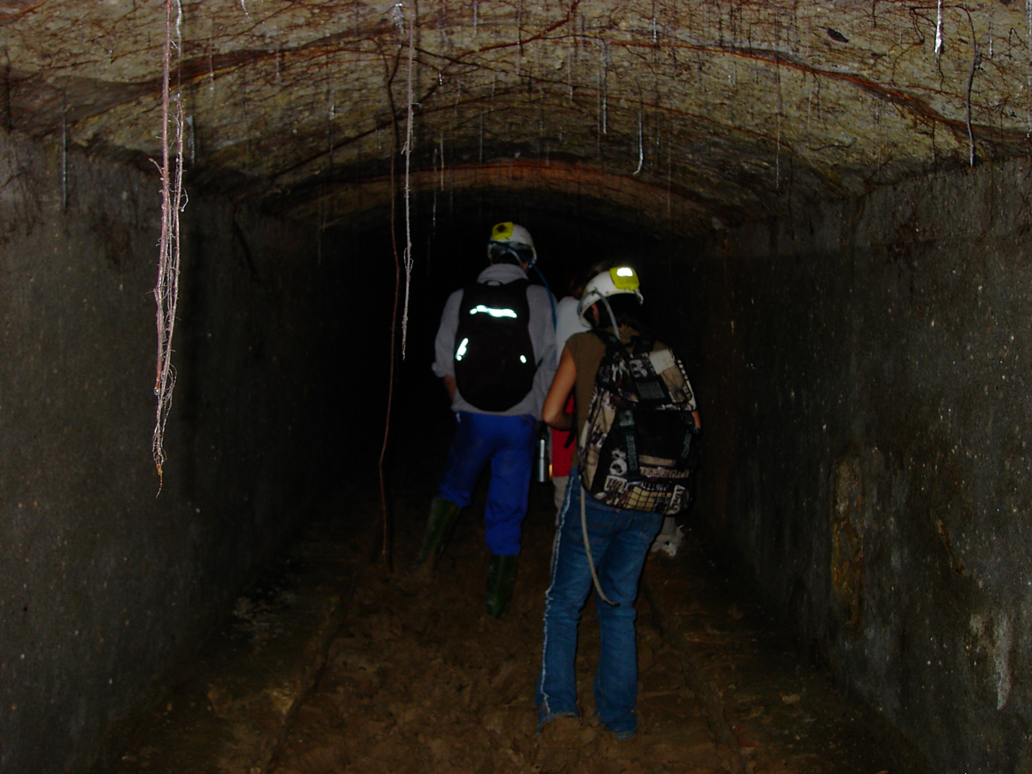 Refugios subterráneos de Almería (construidos durante la Guerra Civil Española) visitados antes de su restauración.